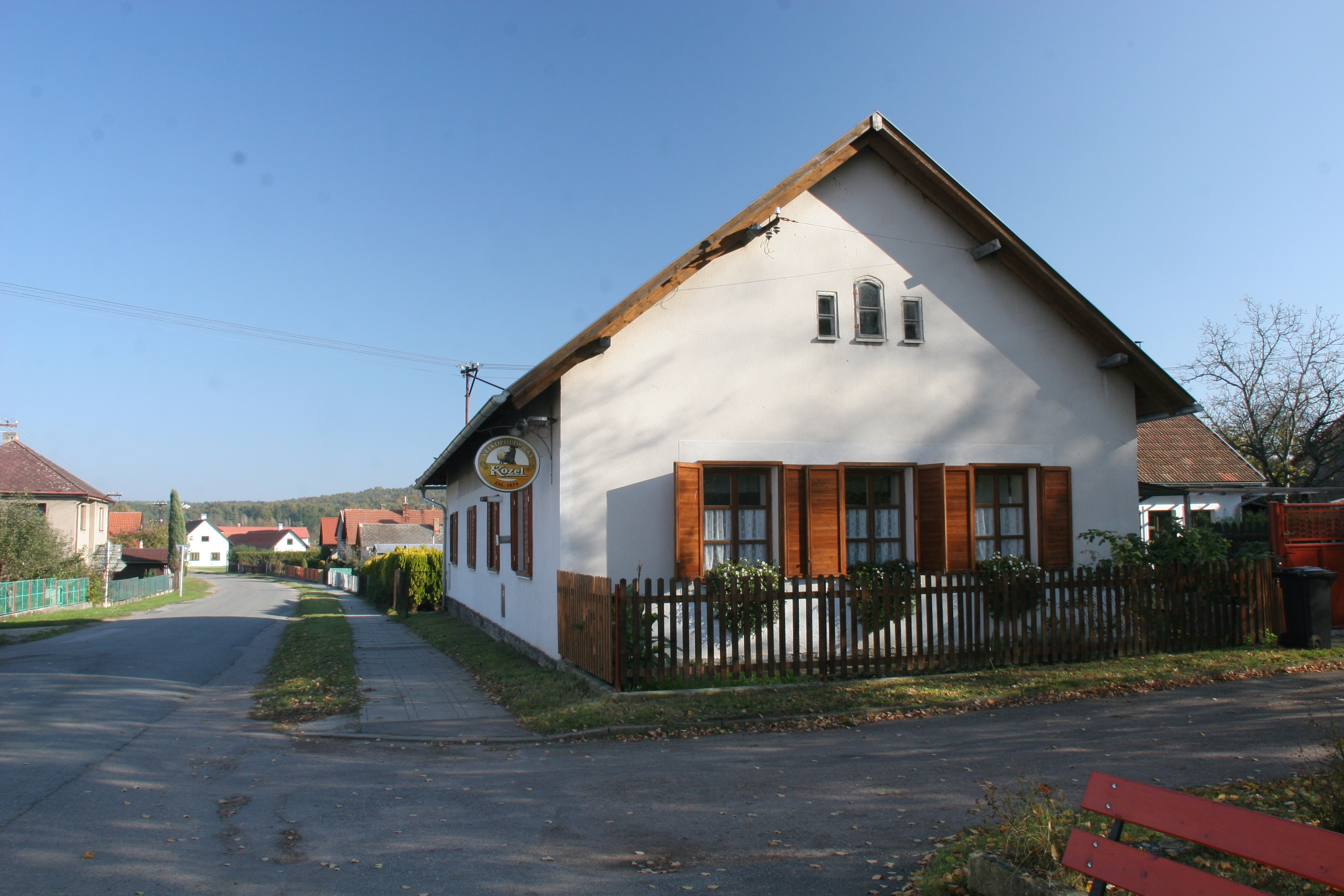 Vysoká u Holic hospoda